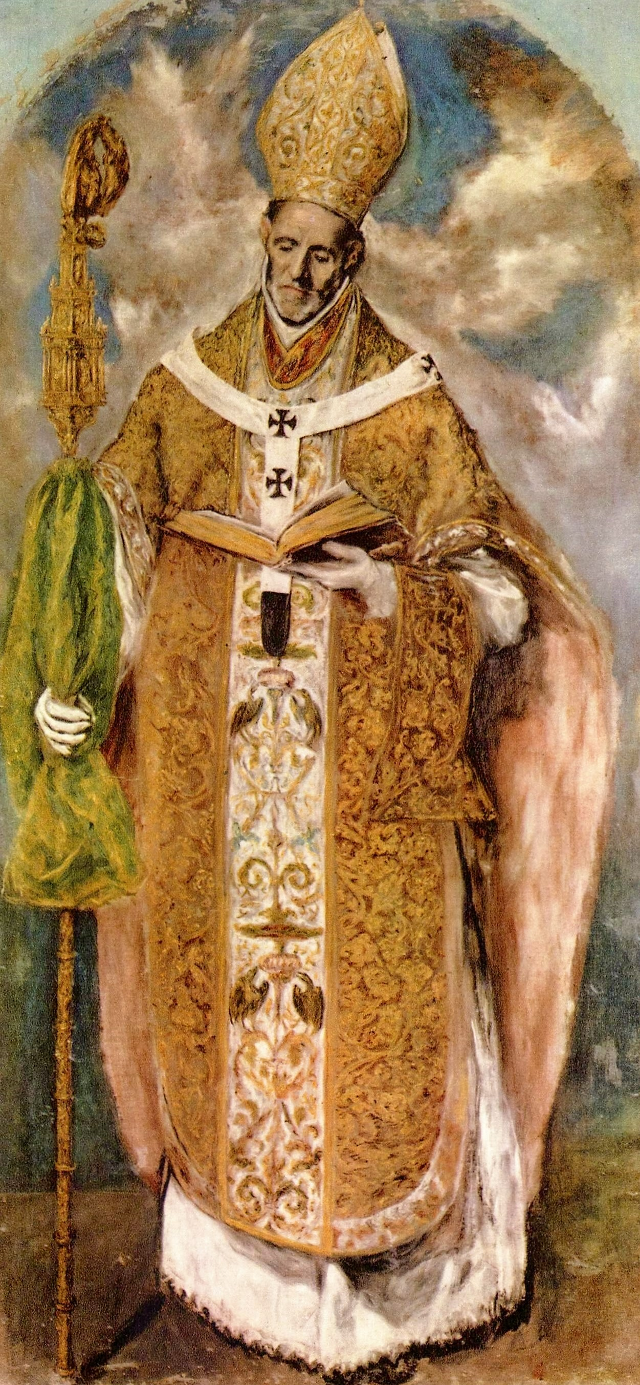 La obra representa al arzobispo San Ildefonso de Toledo, que fue hermano del también arzobispo San Isidoro de Sevilla.